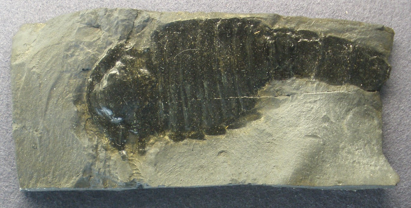 Fossil of Adelophthalmus, an extinct arthropod- Took the photo at Senckenberg Museum of Frankfurt